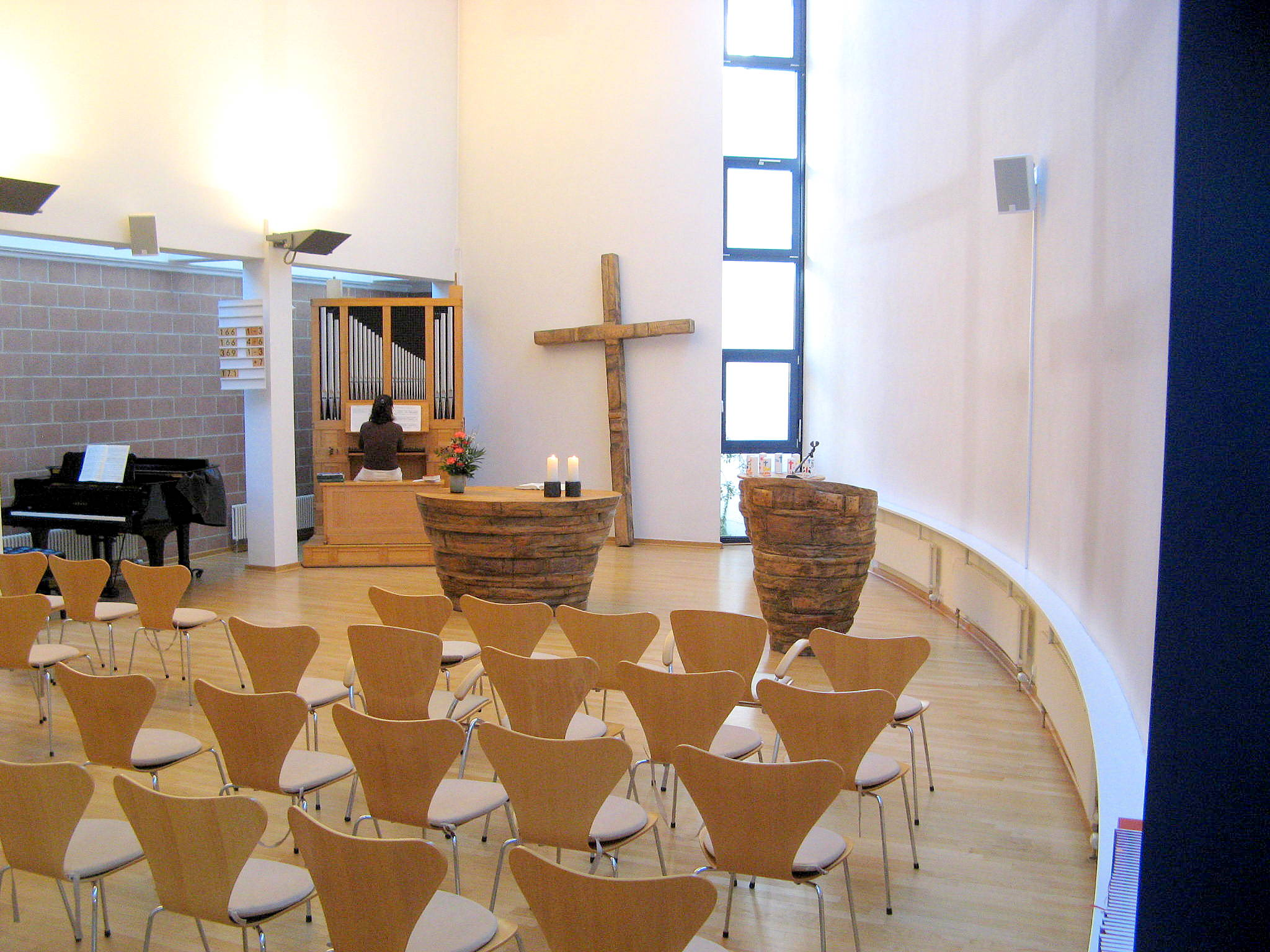 Innenansicht der Evangelischen Erlöserkirche, Wiesbaden-Sauerland